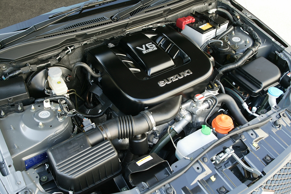 Suzuki H27A V6 engine.